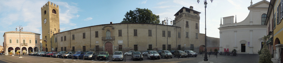 Castel Goffredo, panorama di Piazza Mazzini.